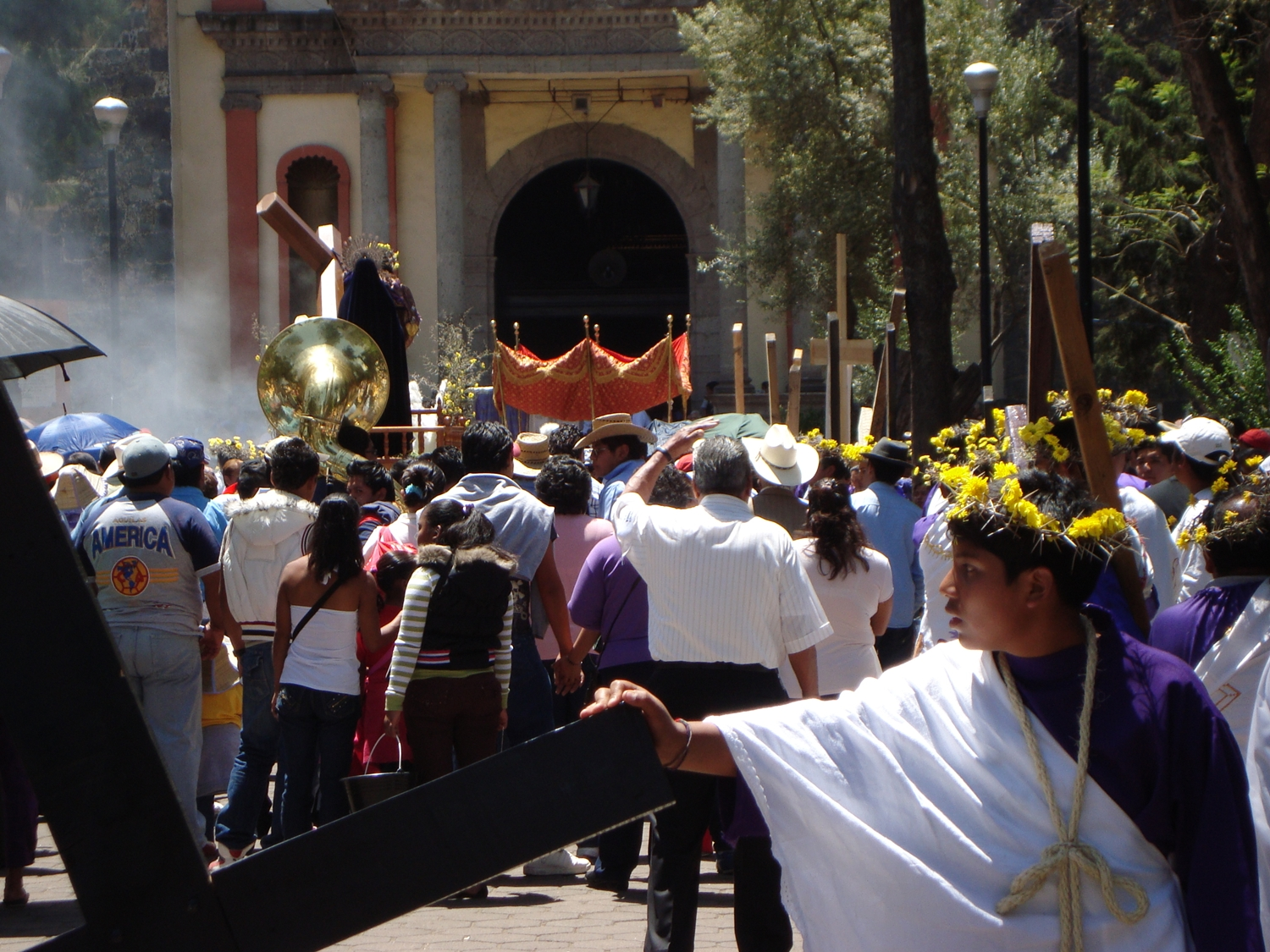 Procesión solemne en el Santuario Nacional de Nuestro Señor de la Cuevita de Iztapalapa (México). Antecedido por las vírgenes -niñas-, el cortejo con el Cristo de la Pasión y la Virgen de la Soledad se apresta a ingresar en el templo. Los acompaña una banda de aliento.